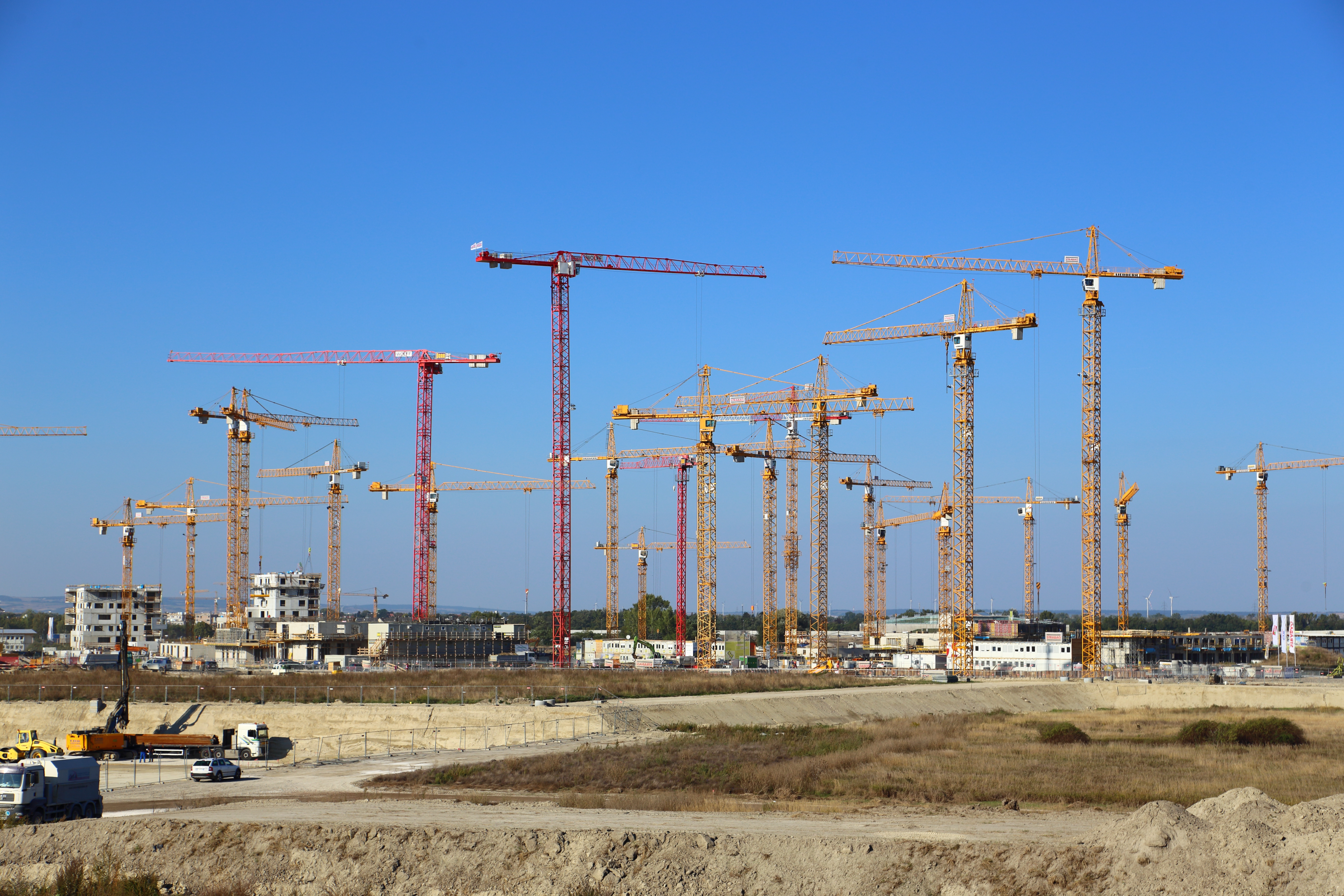 Bauphase der ersten Tranche an Wohnungen im südwestlichen Teil des Seestadt-Areals. Bis Ende 2014 bzw. Anfang 2015 sollen die ersten Wohnungen bezugsfertig sein. Geplant sind bis 2028 rund 10.500 Wohneinheiten für mehr als 20.000 Menschen sowie Betriebsstätten für rund 20.000 Arbeitsplätze.